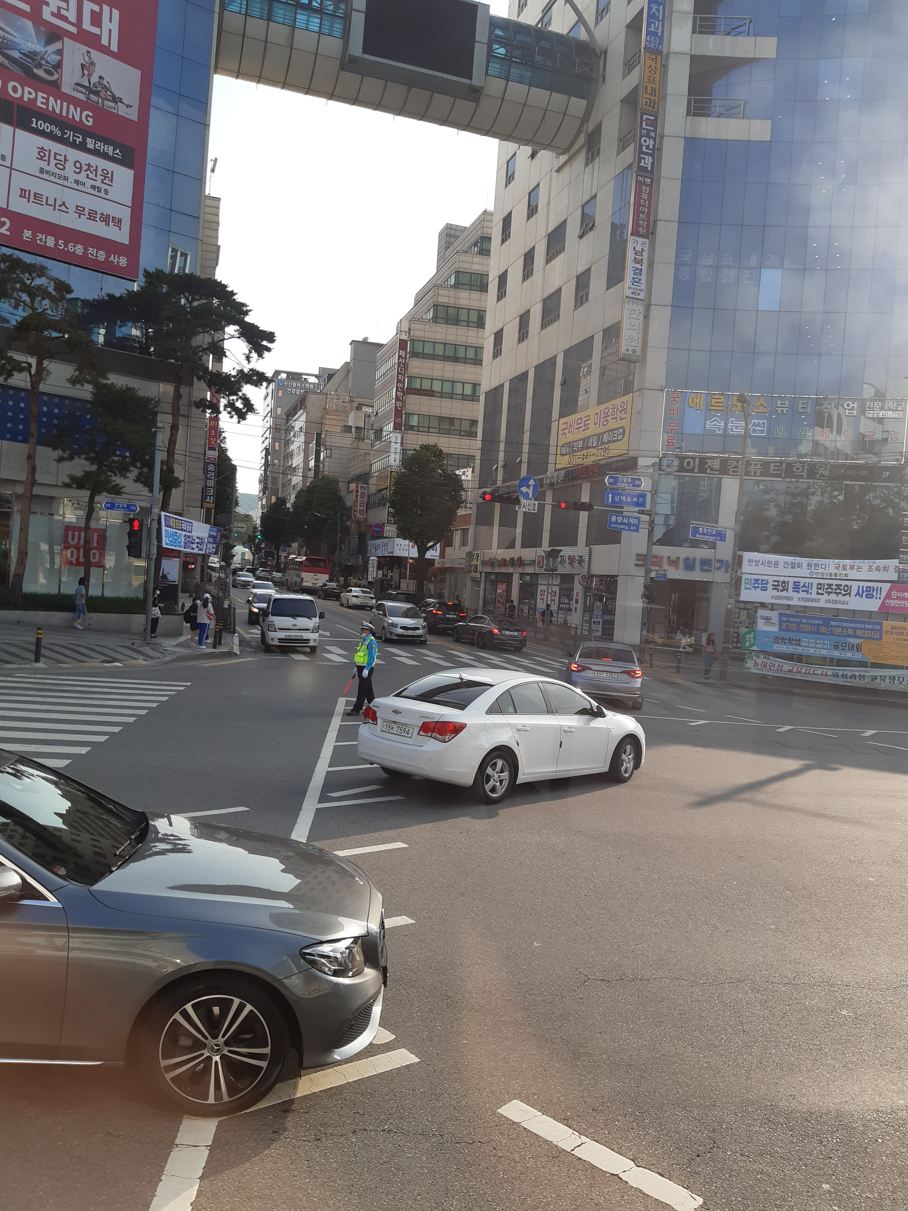 경기도 안양시의 도로 (안양로)